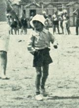 Benito Mussolini con il figlio Romano sulla spiaggia di Riccione nel 1932.